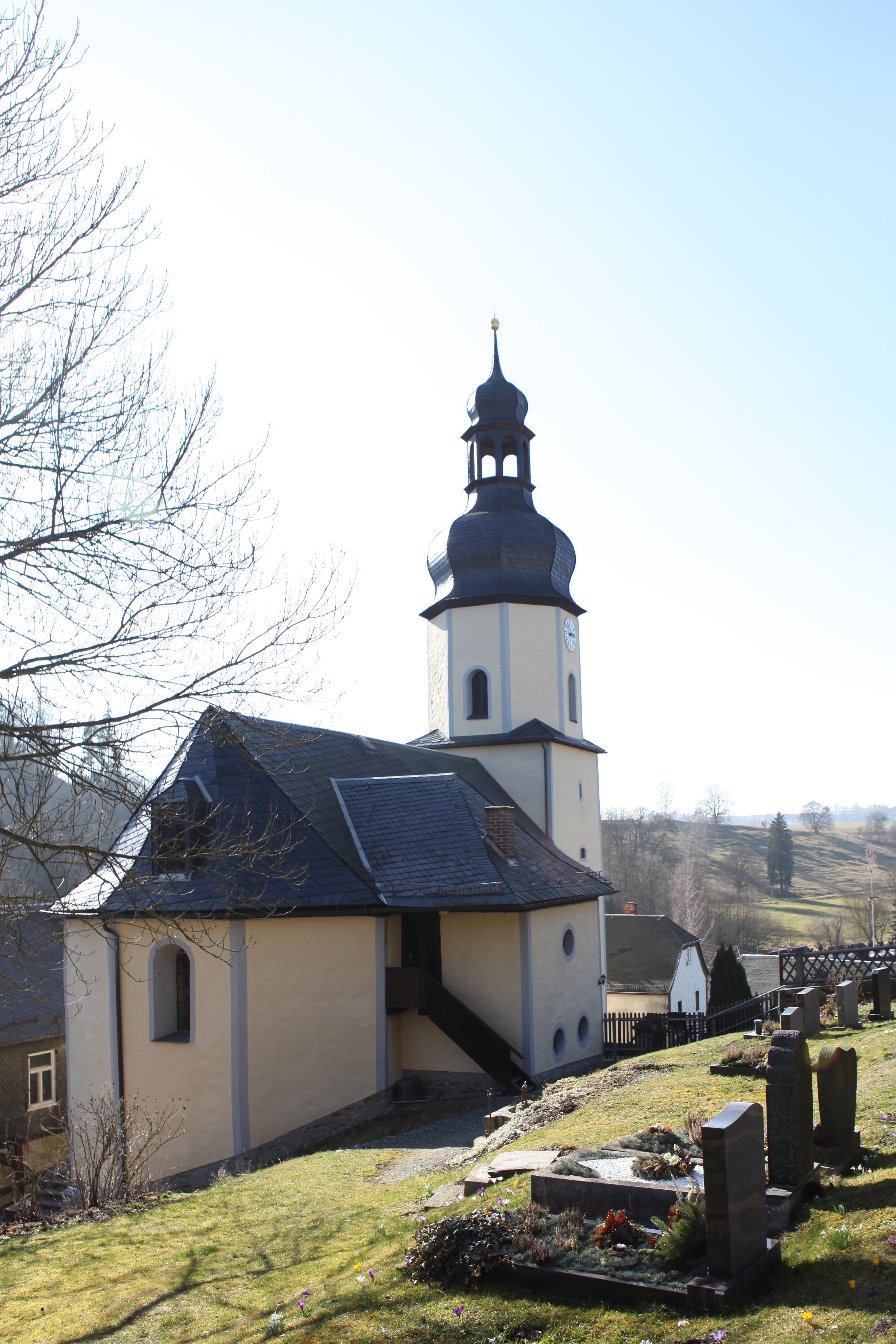 Sparnberg-Ev-Kirche